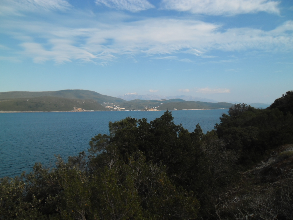 pogled na ulaz u Boku kotorsku s poluotoka Prevlake